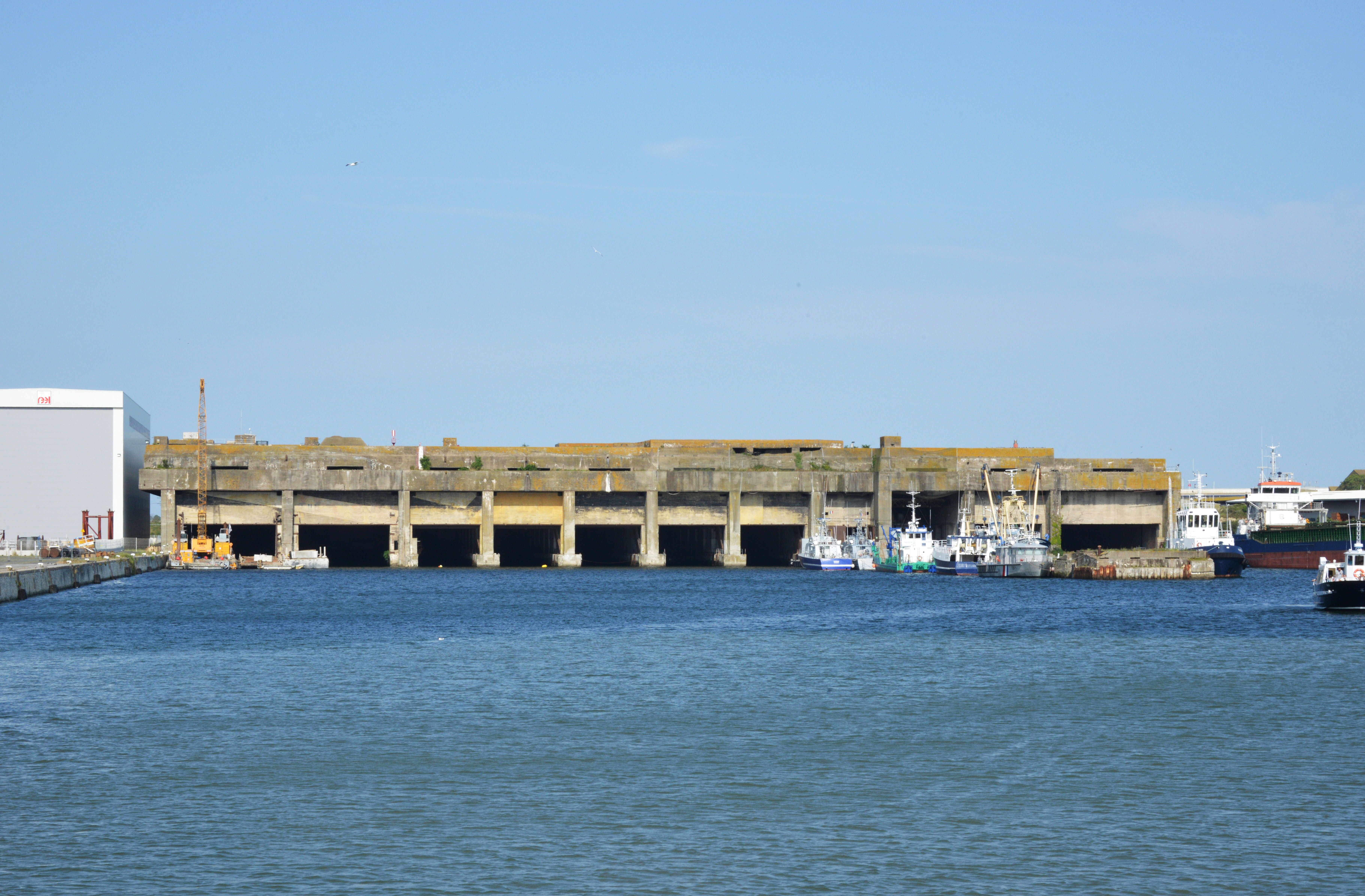 La façade ouest du U-Boot-Bunker de la base sous-marine allemande de La Pallice avec ses 10 alvéoles pour accueillir les sous-marins (U-boote, c’est-à-dire Unterseeboote). La Rochelle, Charente-Maritime, France.